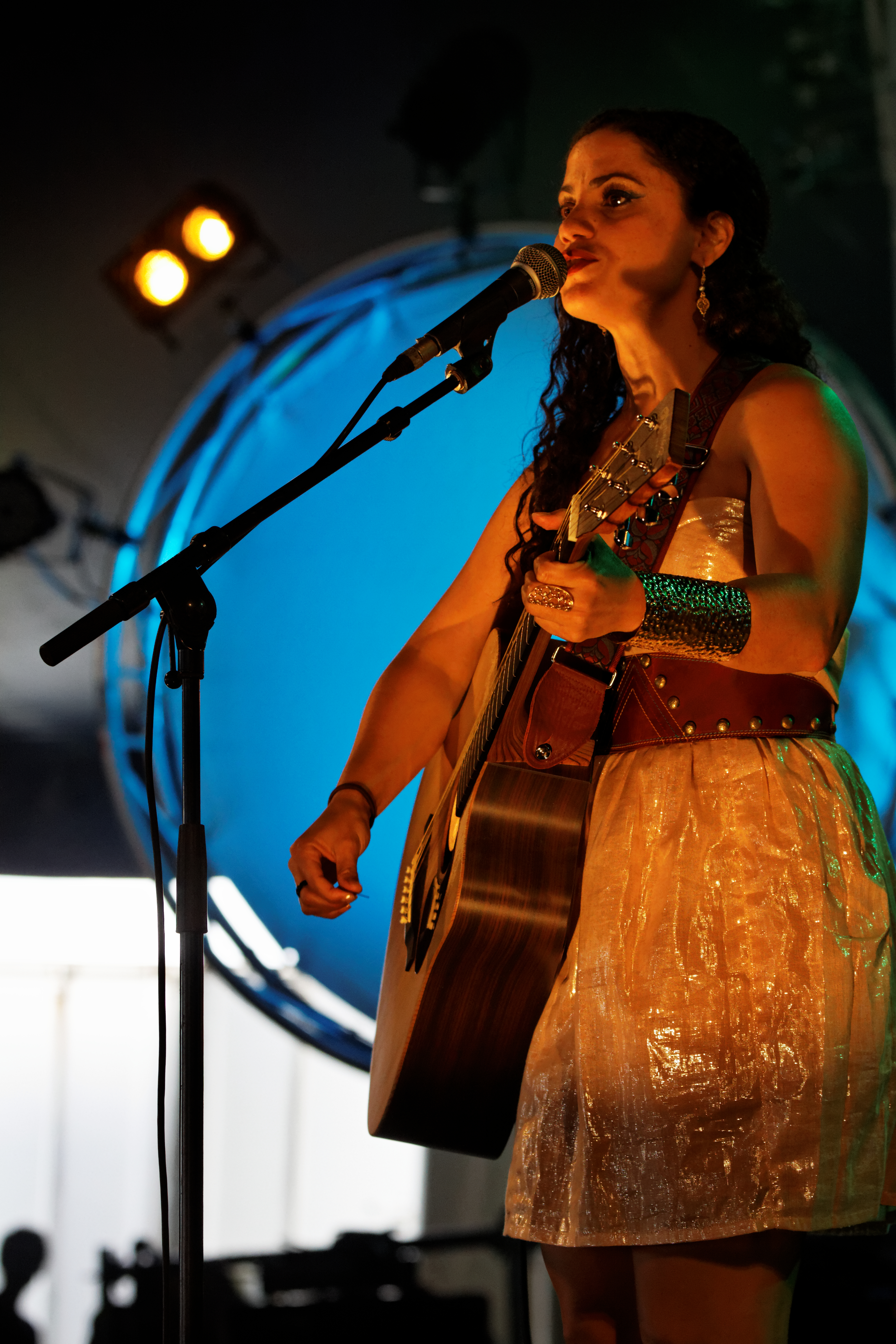 Emel Mathlouthi en concert sur la scène cabaret lors du festival du bout du Monde à Crozon dans le Finistère (France).